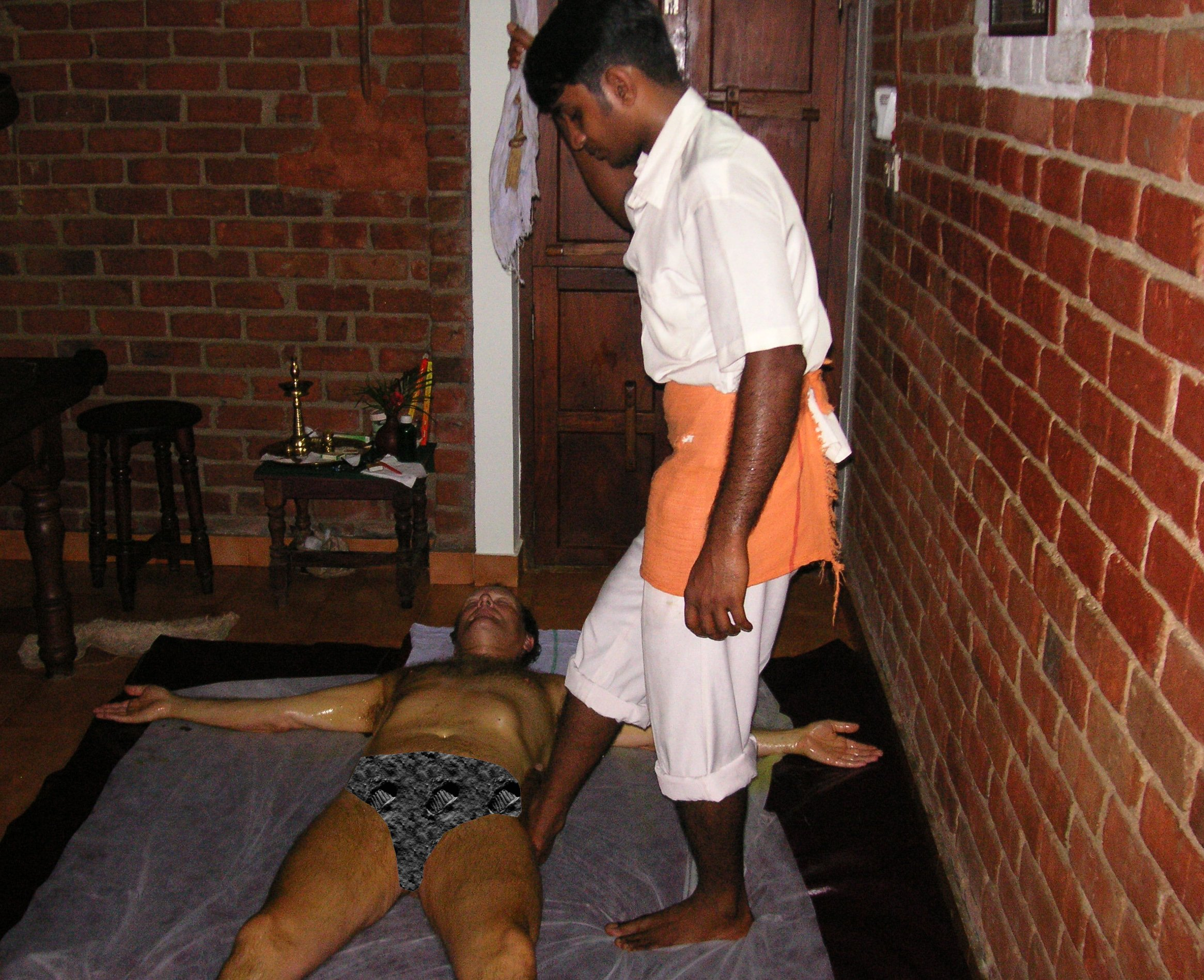 Fussmassage, erfolgt normalerweise nackt, mit GIMP Badehose montiert